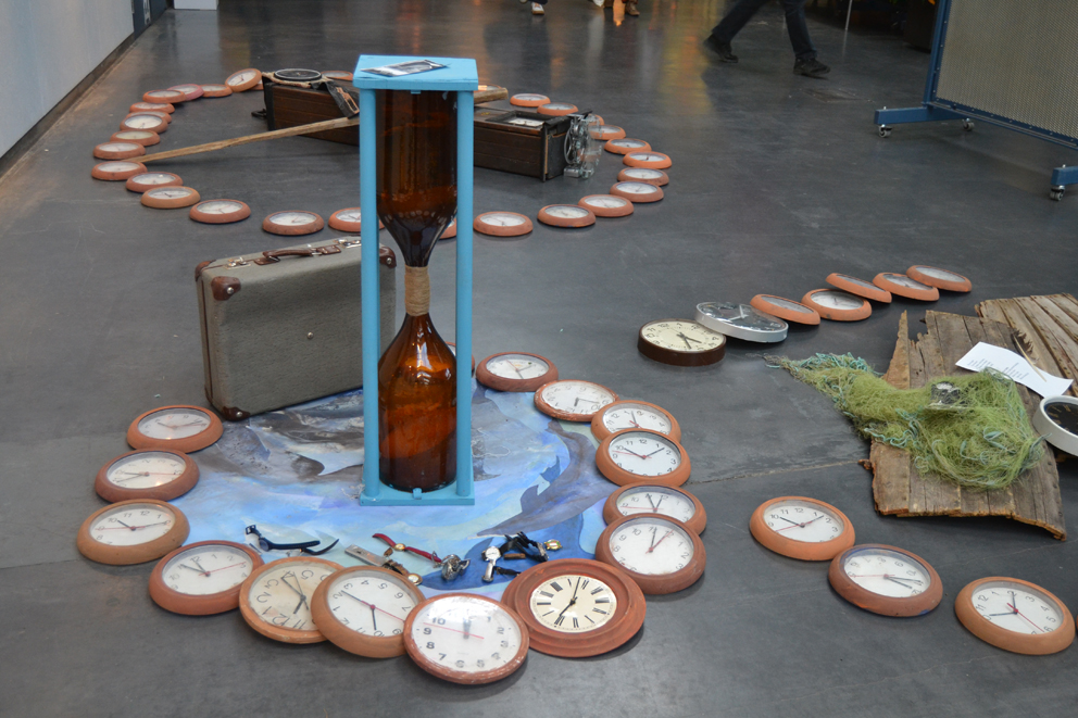 Installationen Tidens Hav , culturen Västerås Kulturnatten 2011.